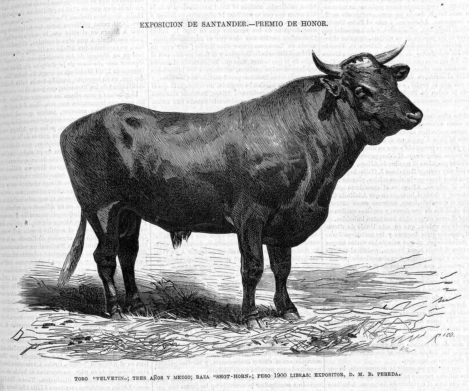 Exposición de Santander. Premio de honor. Toro "Velvetín"; tres años y medio; raza 'shot-horn'; peso 1900 libras; expositor, D. M. B. Pereda.